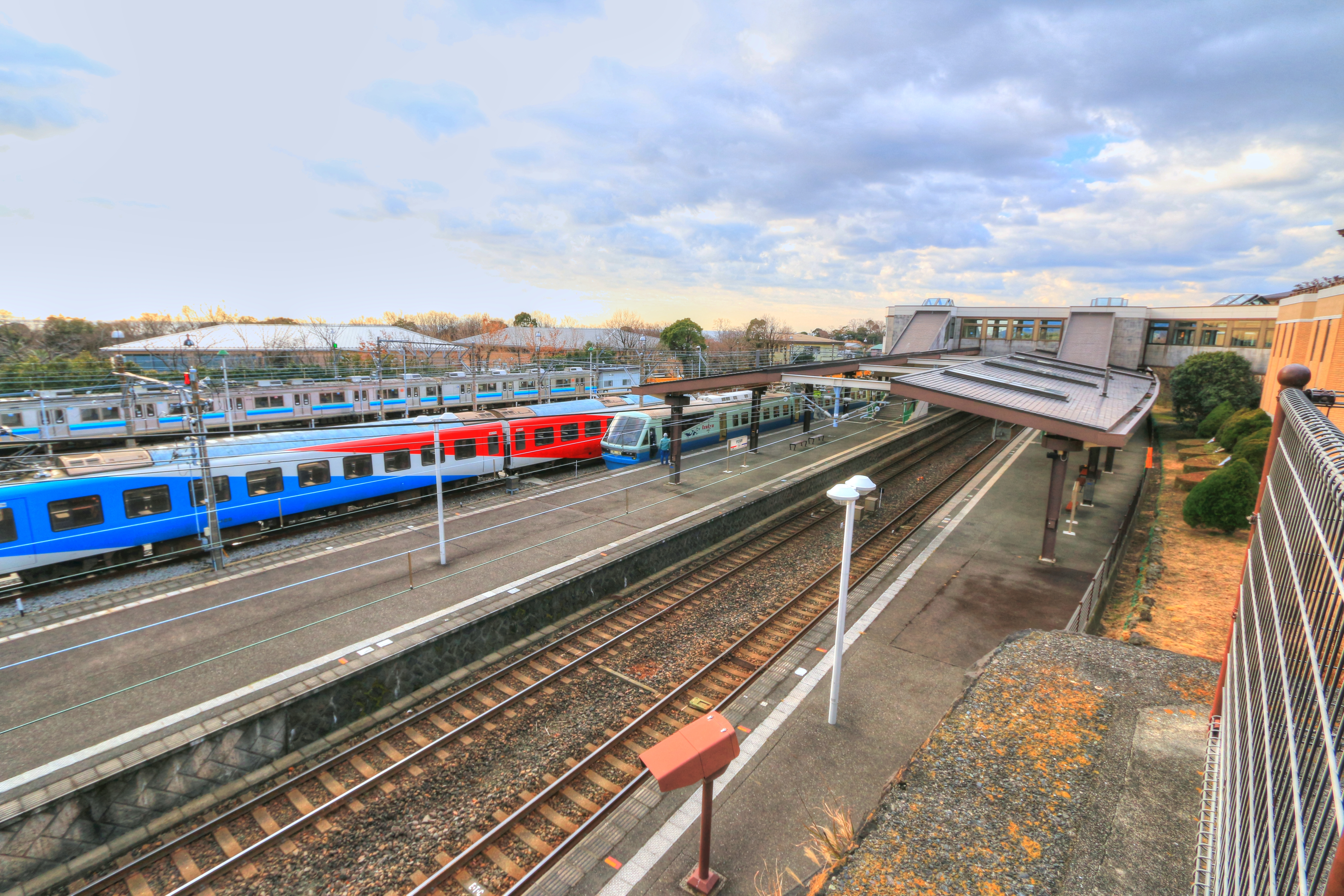 伊豆高原駅